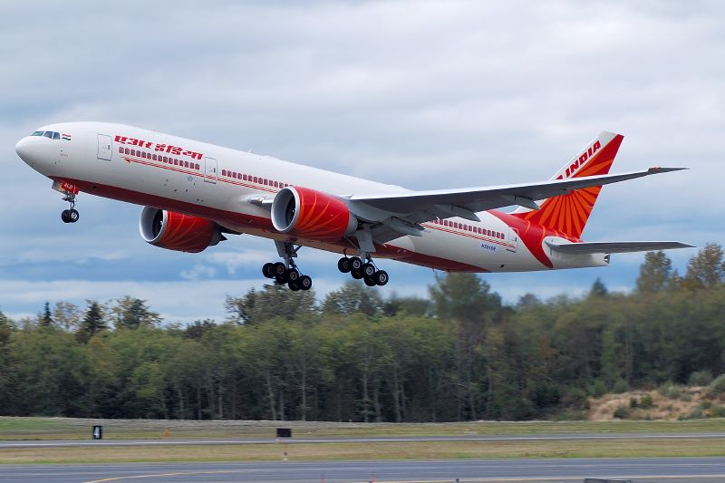 Air India 772LR